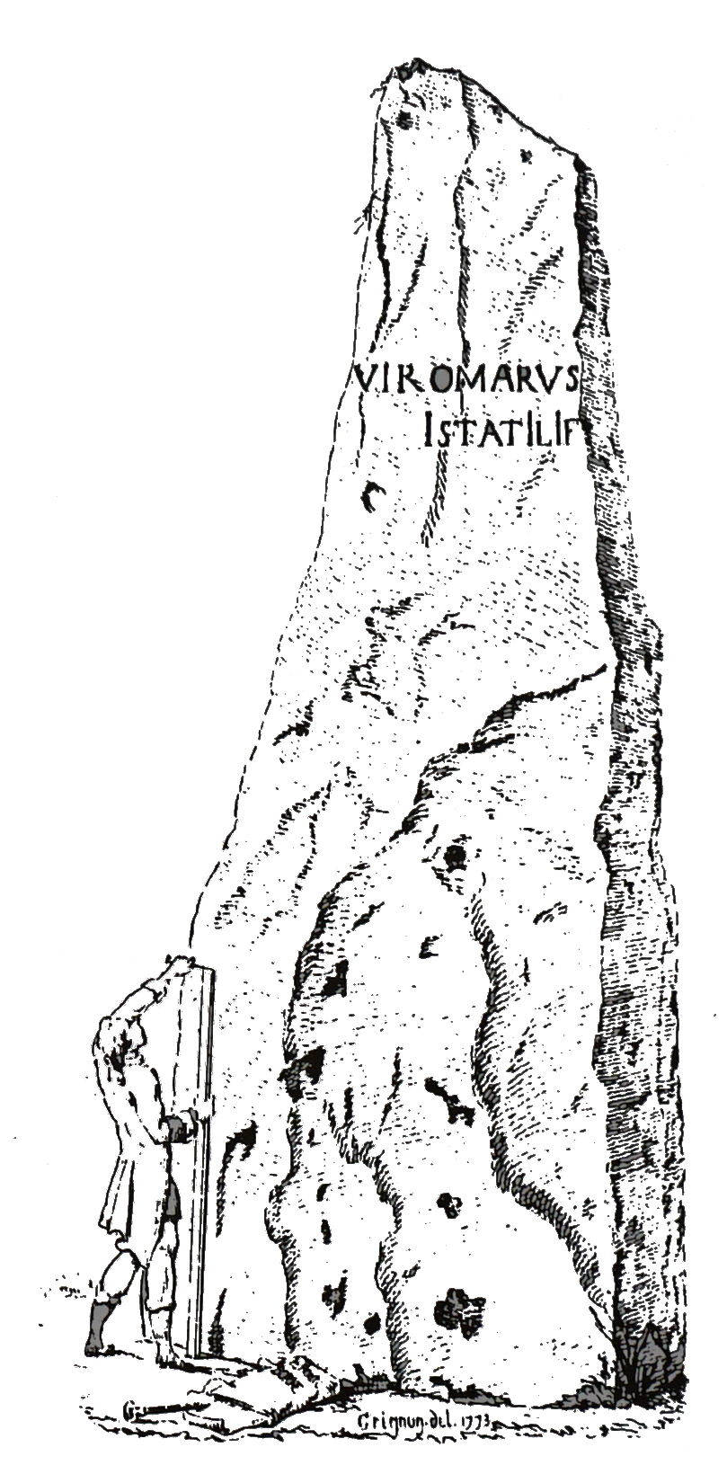 relevé par grignon.